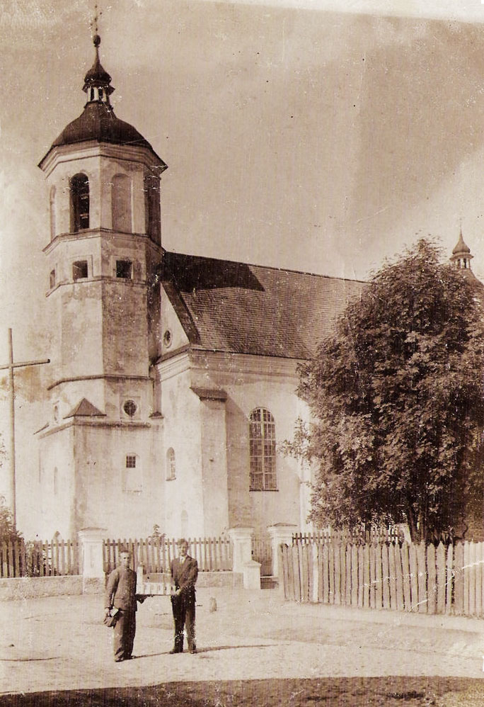 Беларуская (тарашкевіца): Фарны касьцёл у Клецку